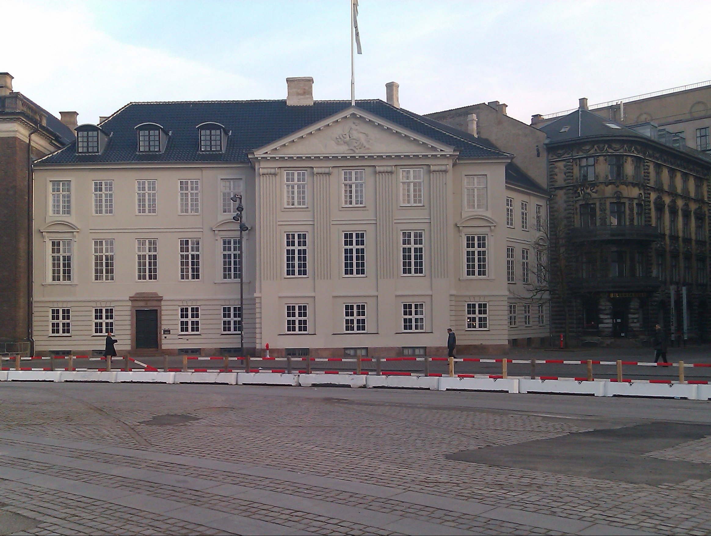 Harsdorffs Hus, Kongens Nytorv, København